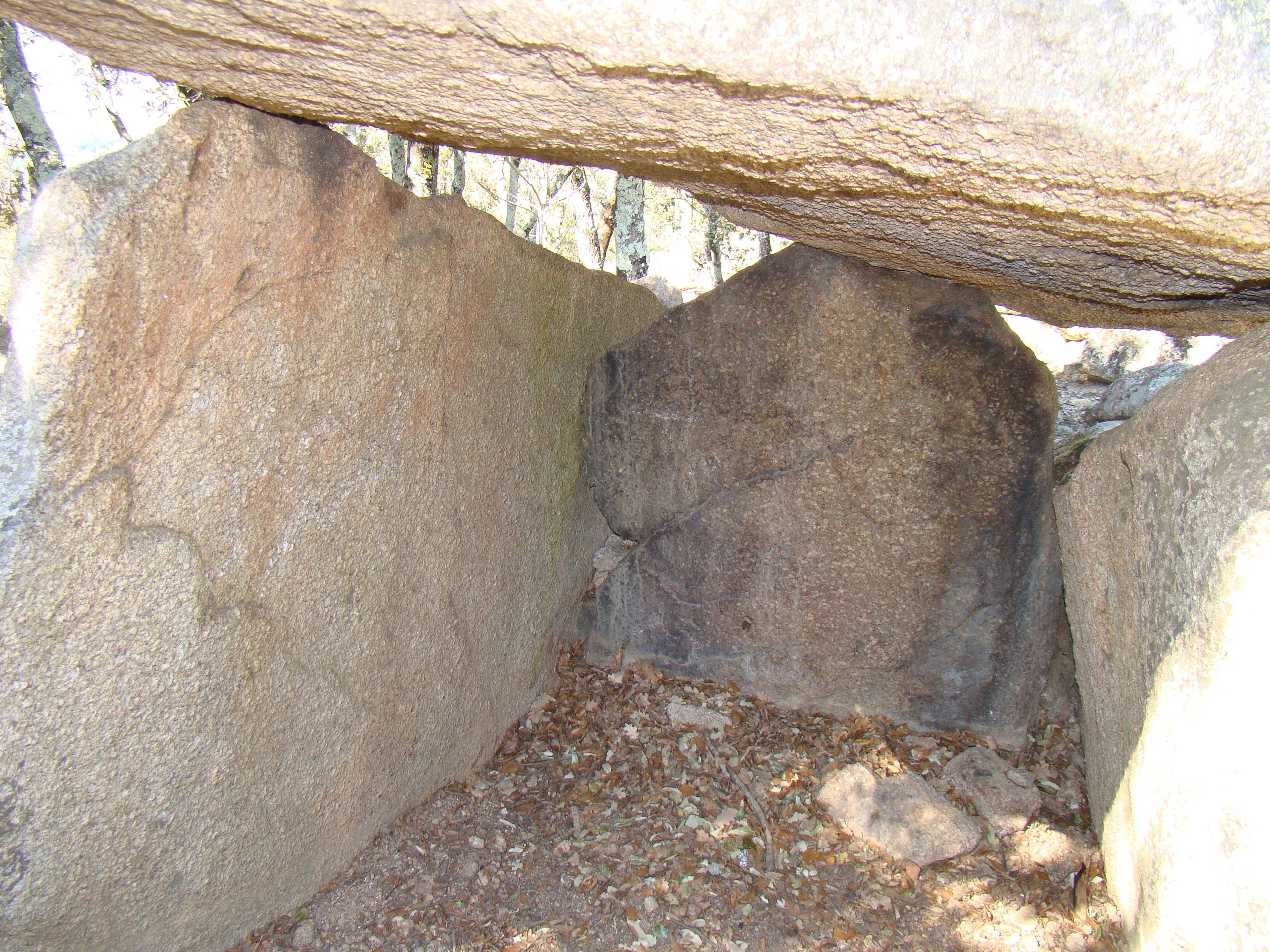 Dolmen Caixa de Rottlan